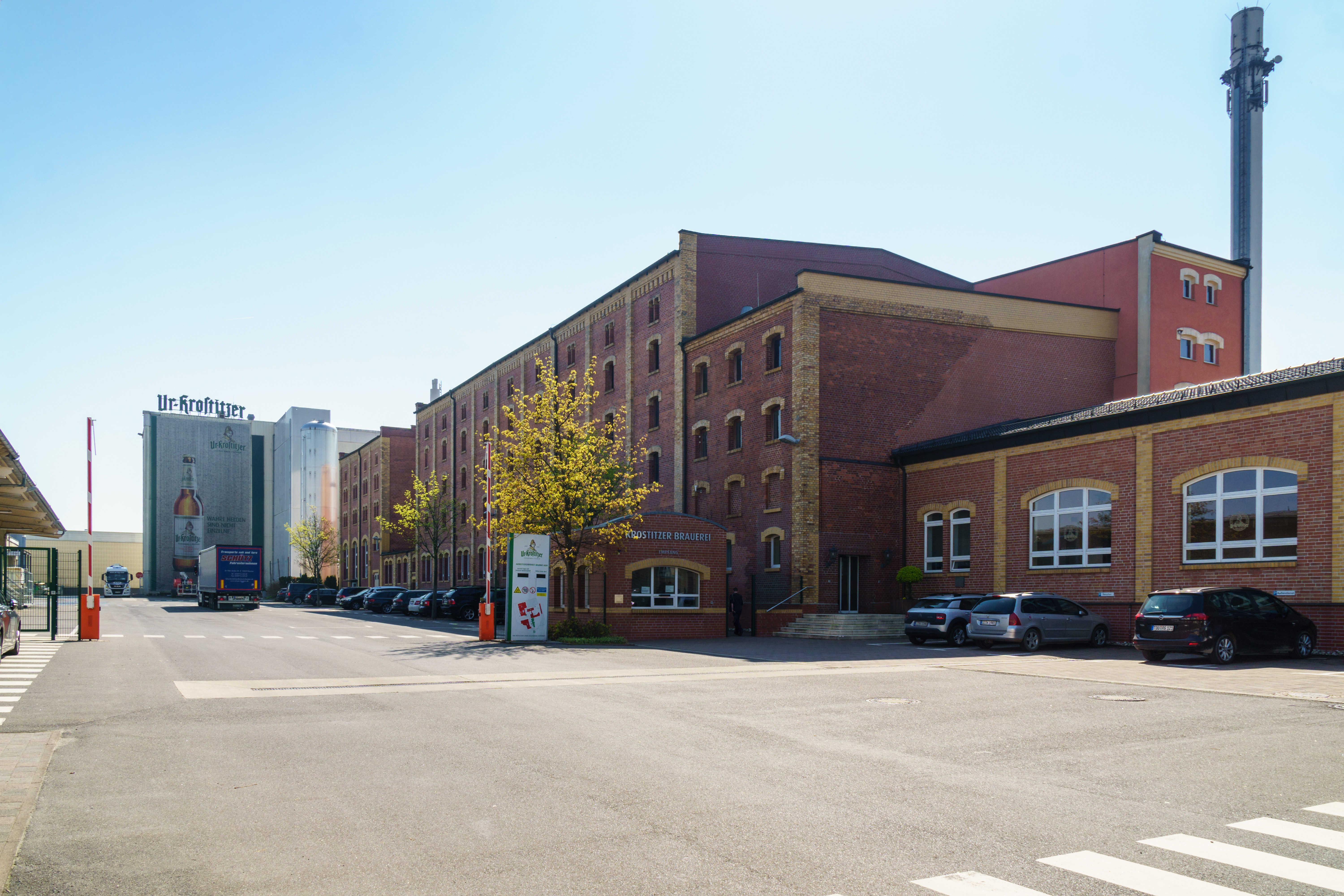 Verwaltungsgebäude einer Brauerei Brauereistraße 12 in Krostitz